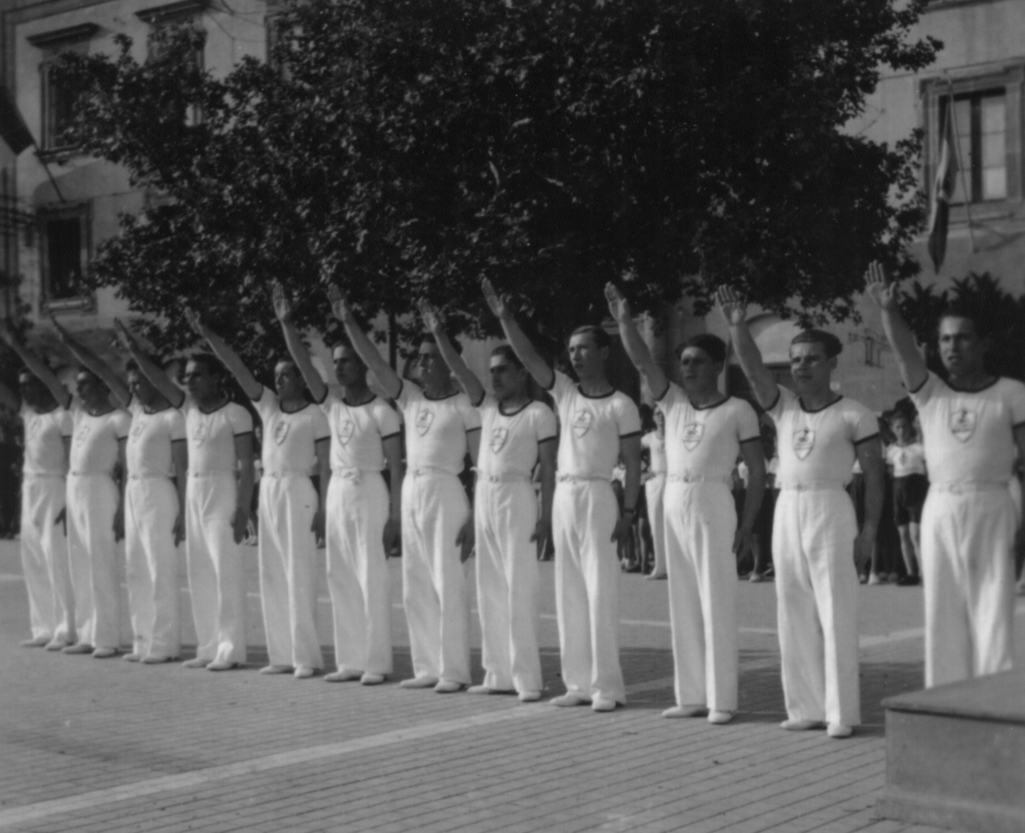 Italia. Un saggio ginnico pubblico eseguito durante il periodo fascista.